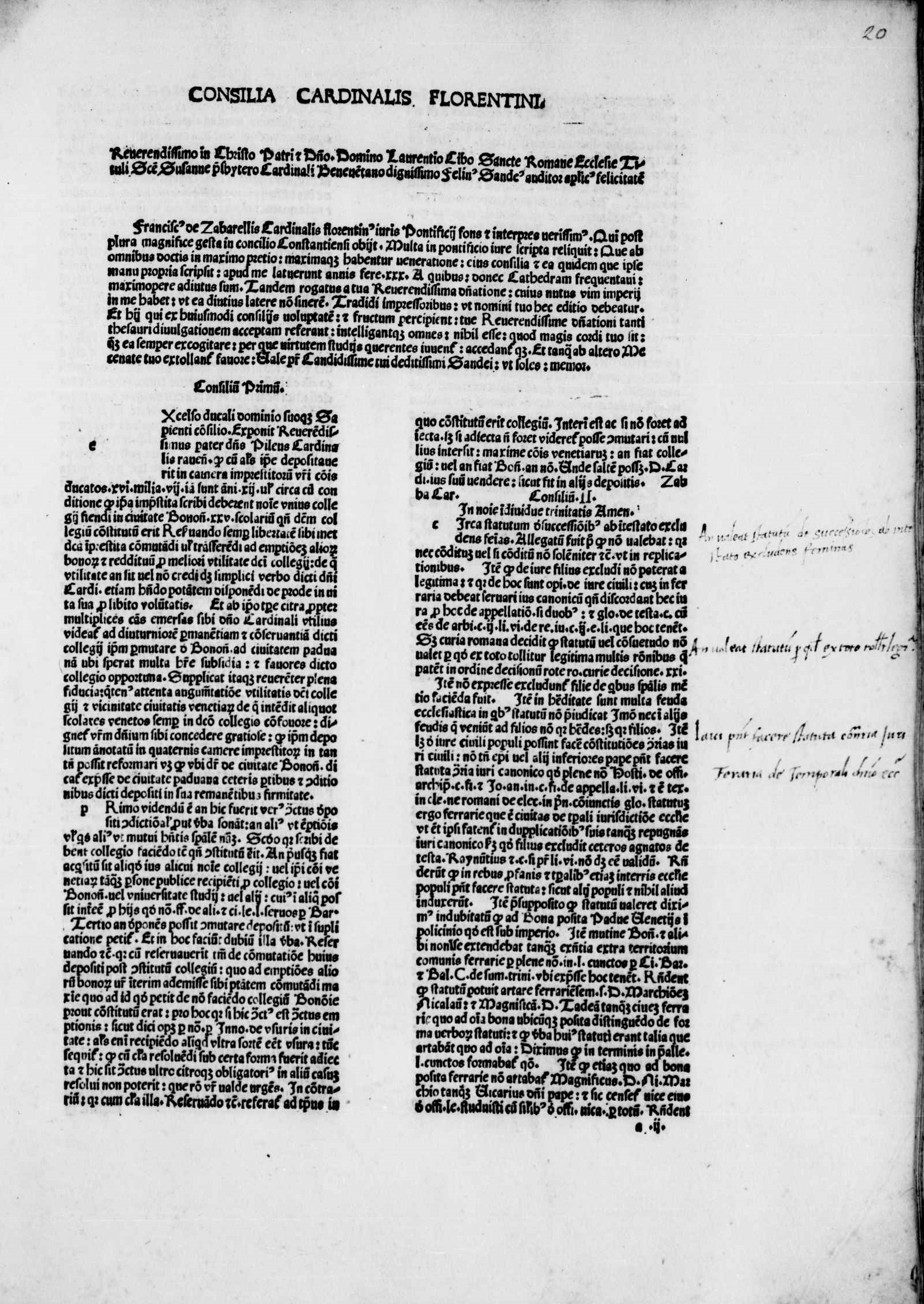 carta A2r